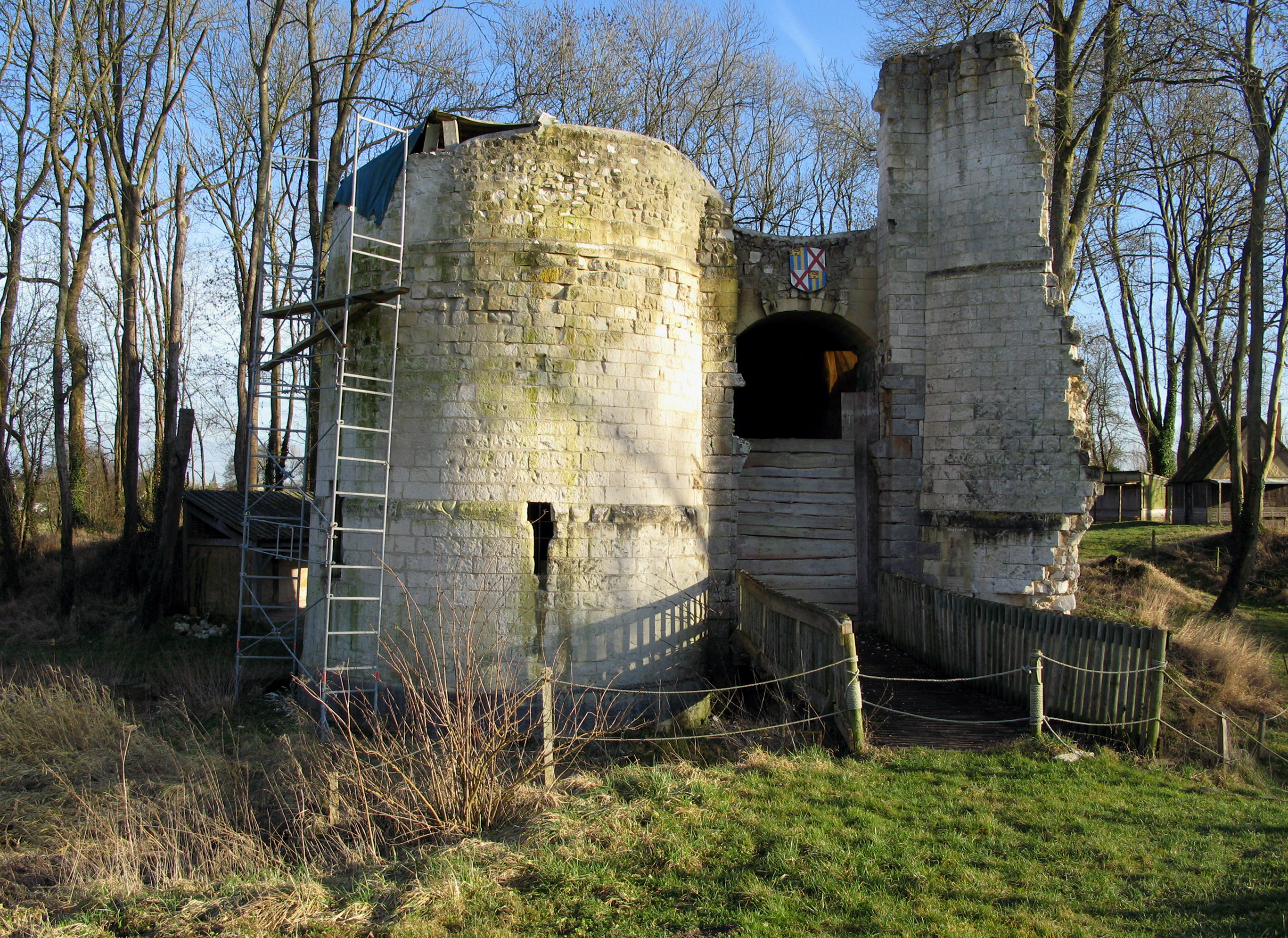 Eaucourt-sur-Somme (Somme, France) - Le château. .